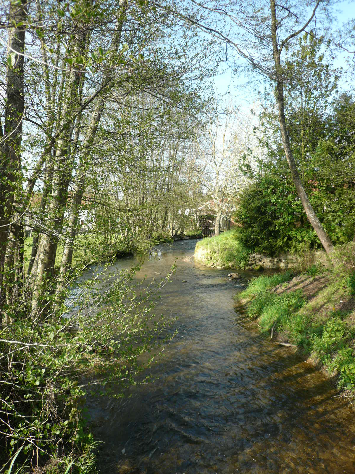 Rivière "La Mouche" à Humes